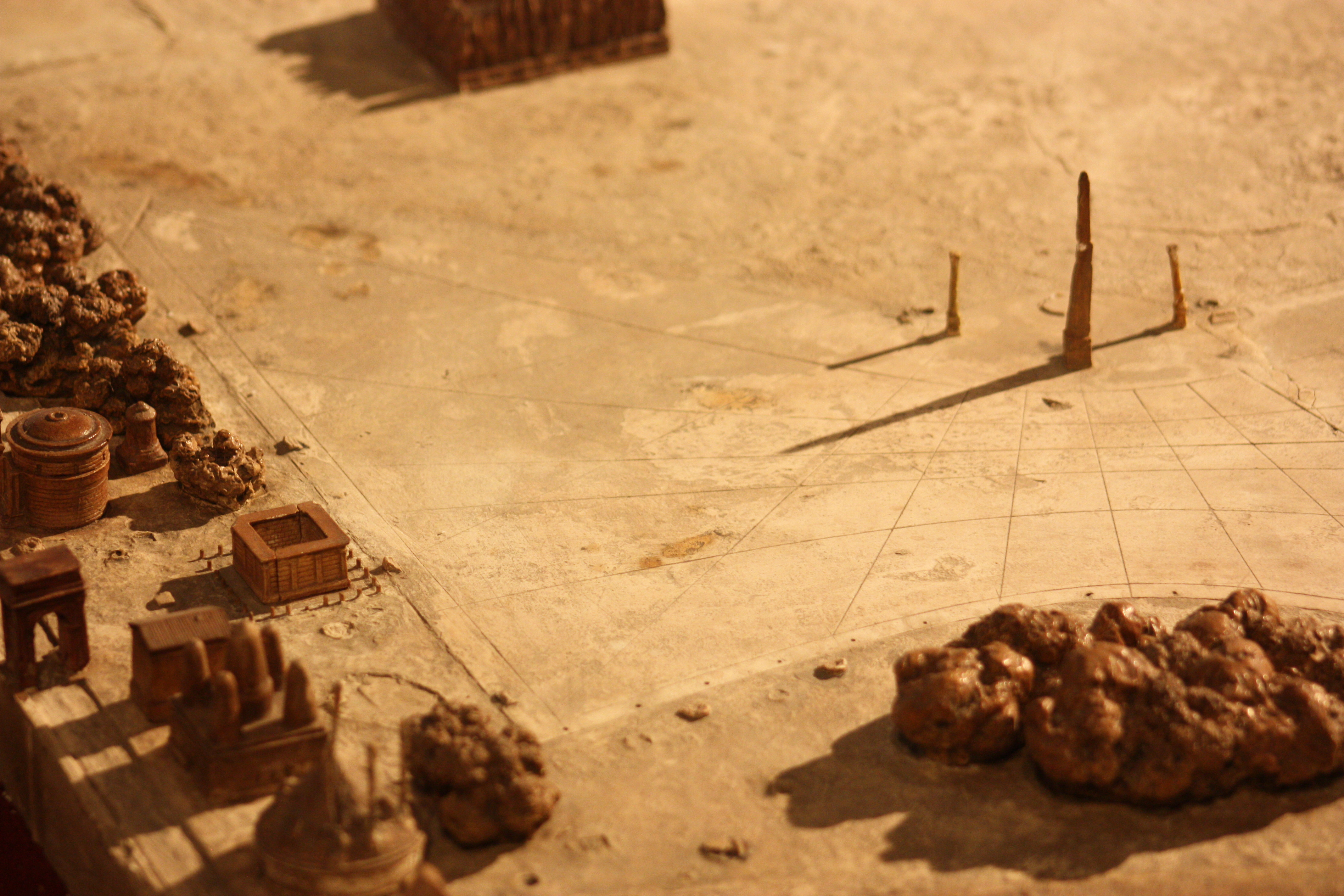 Horologium et ara pacis